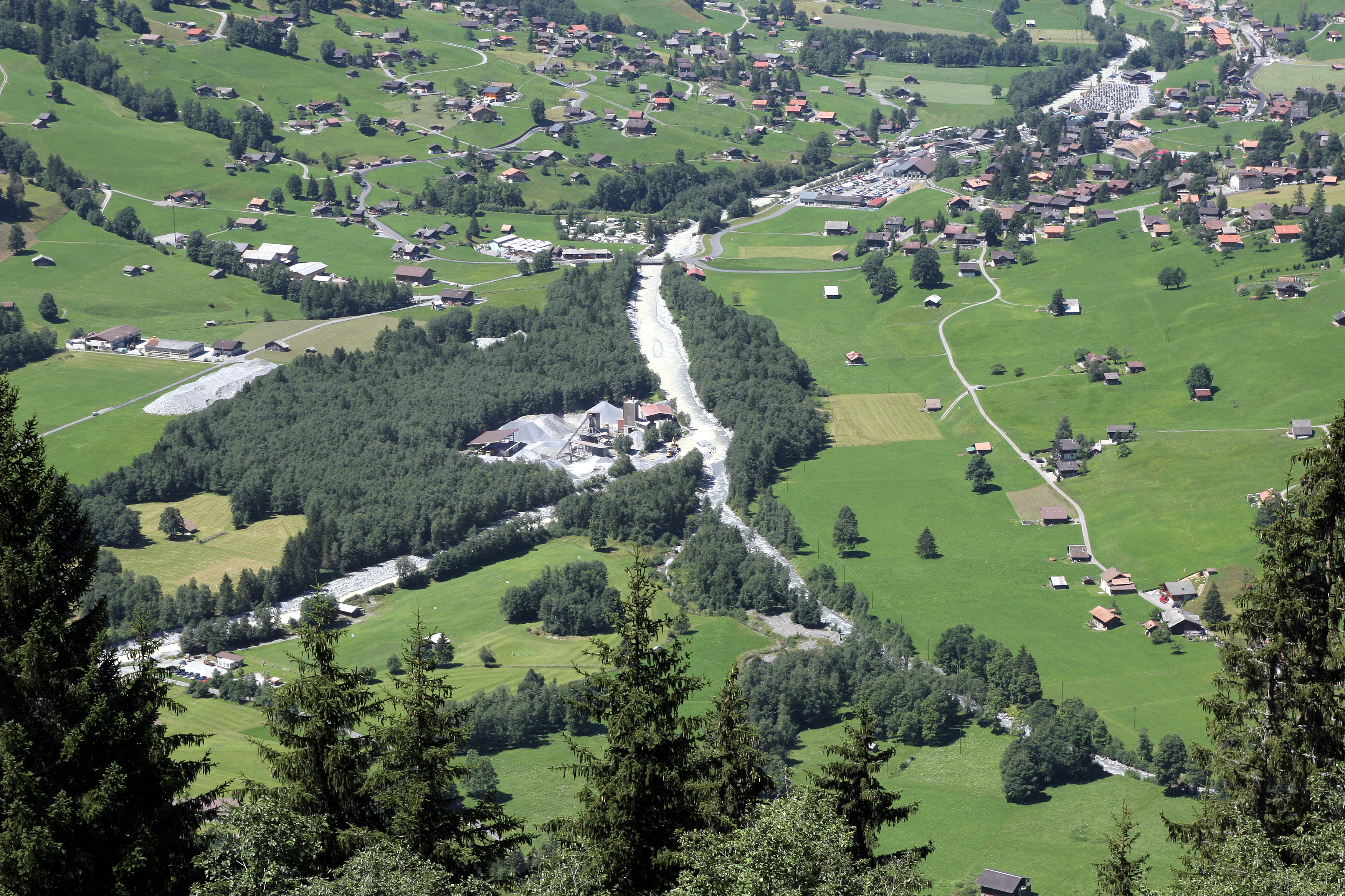 Der Zusammenfluss der Weissen Lütschine (links) vom Unteren Grindelwaldgletscher und der Schwarzen Lütschine (rechts) vom Oberen Grindelwaldgletscher in Grindelwald.